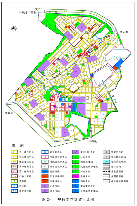 中文（台灣）: 觀音( 草漯地區) 都市計畫